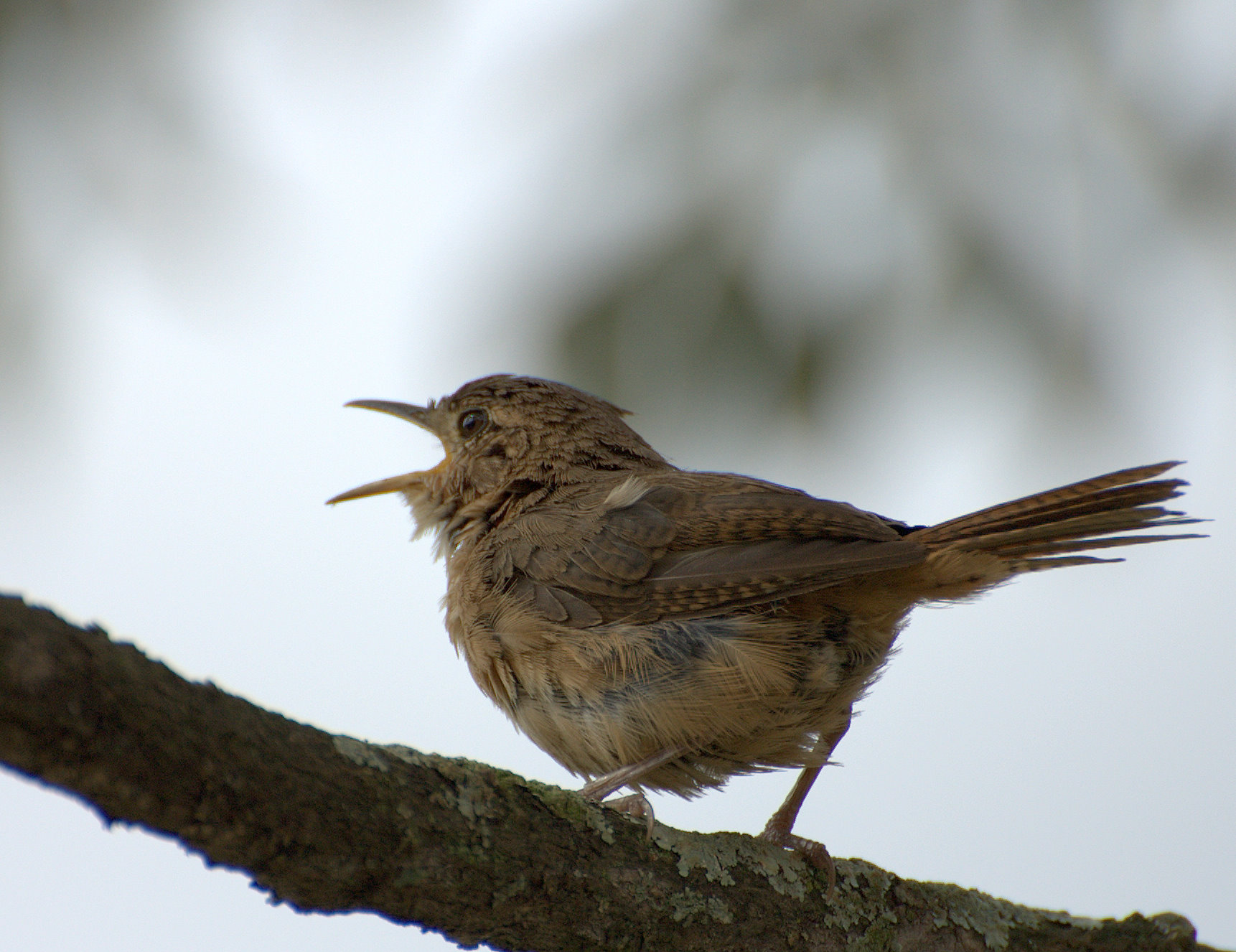 Parque da Independência, Museu do Ipiranga, São Paulo